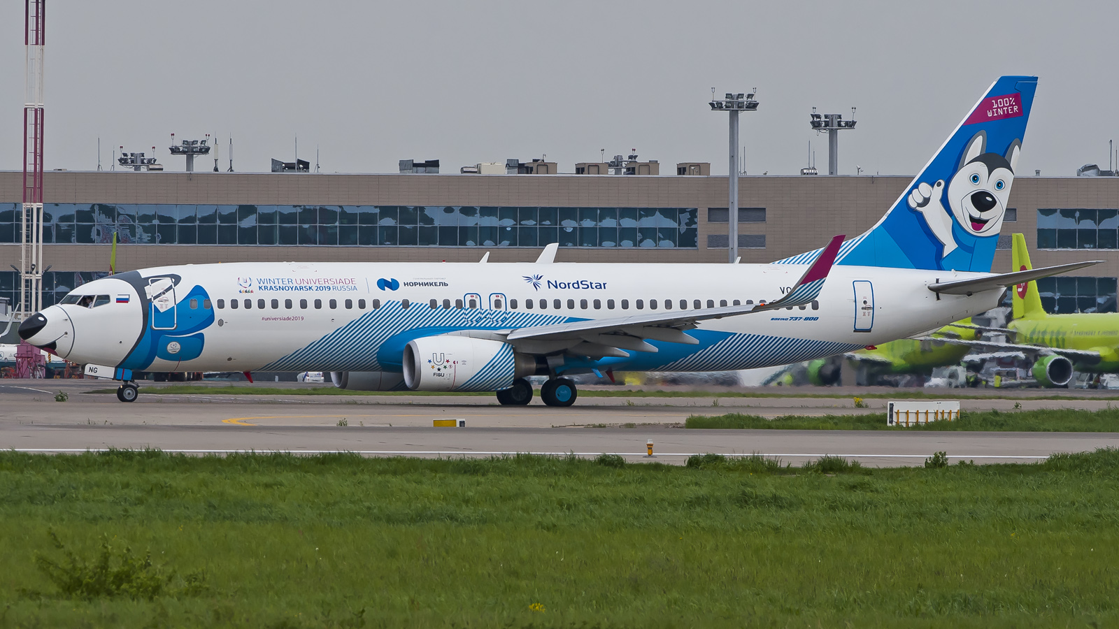 VQ-BNG - LaikaJet Boeing 737-800 Nordstar - Winter Universiade 2019 livery DME | UUDD